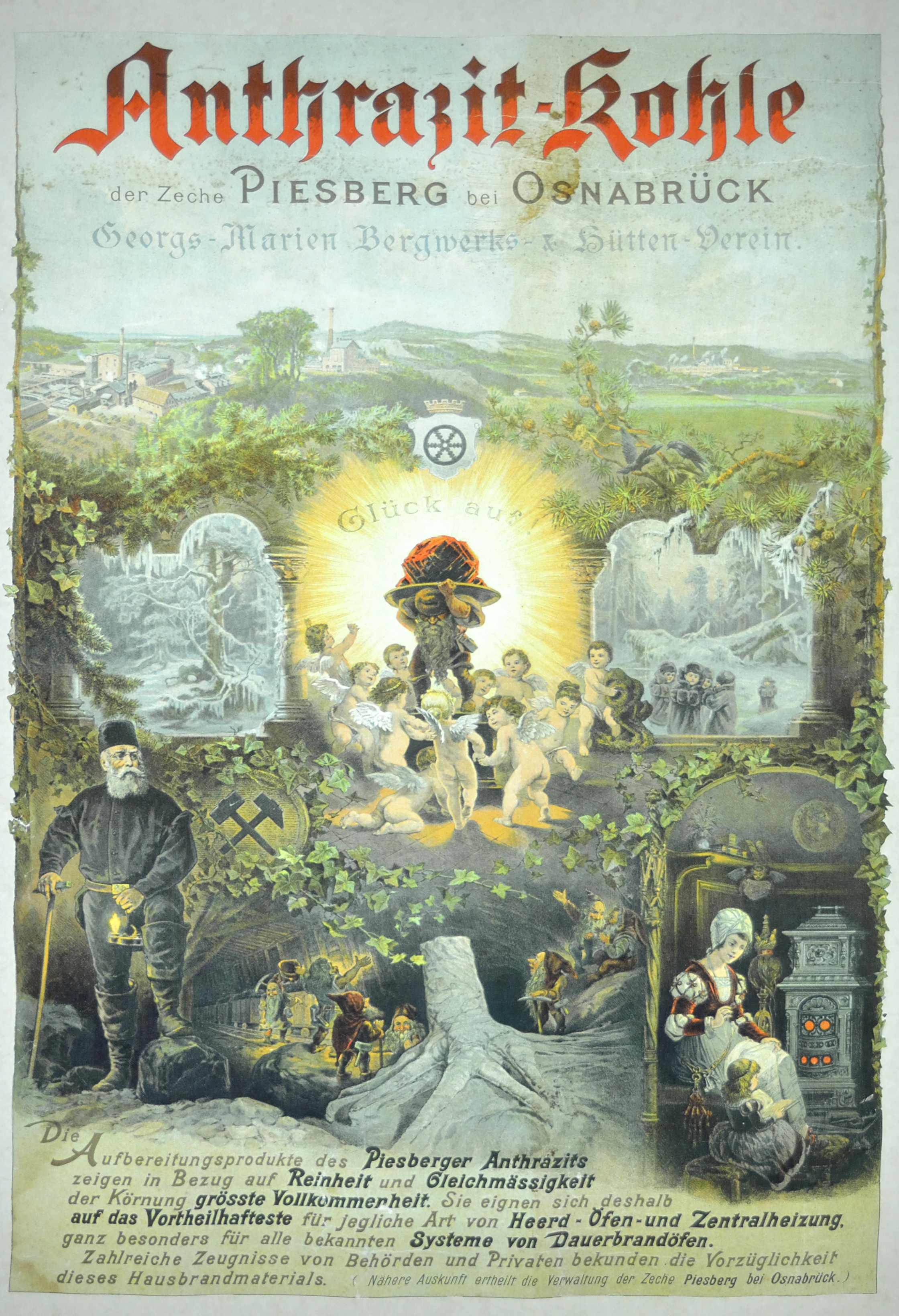 Impressionen aus dem "Museum Industriekultur" in Osnabrück.